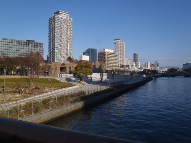 大阪市北区中之島公園。